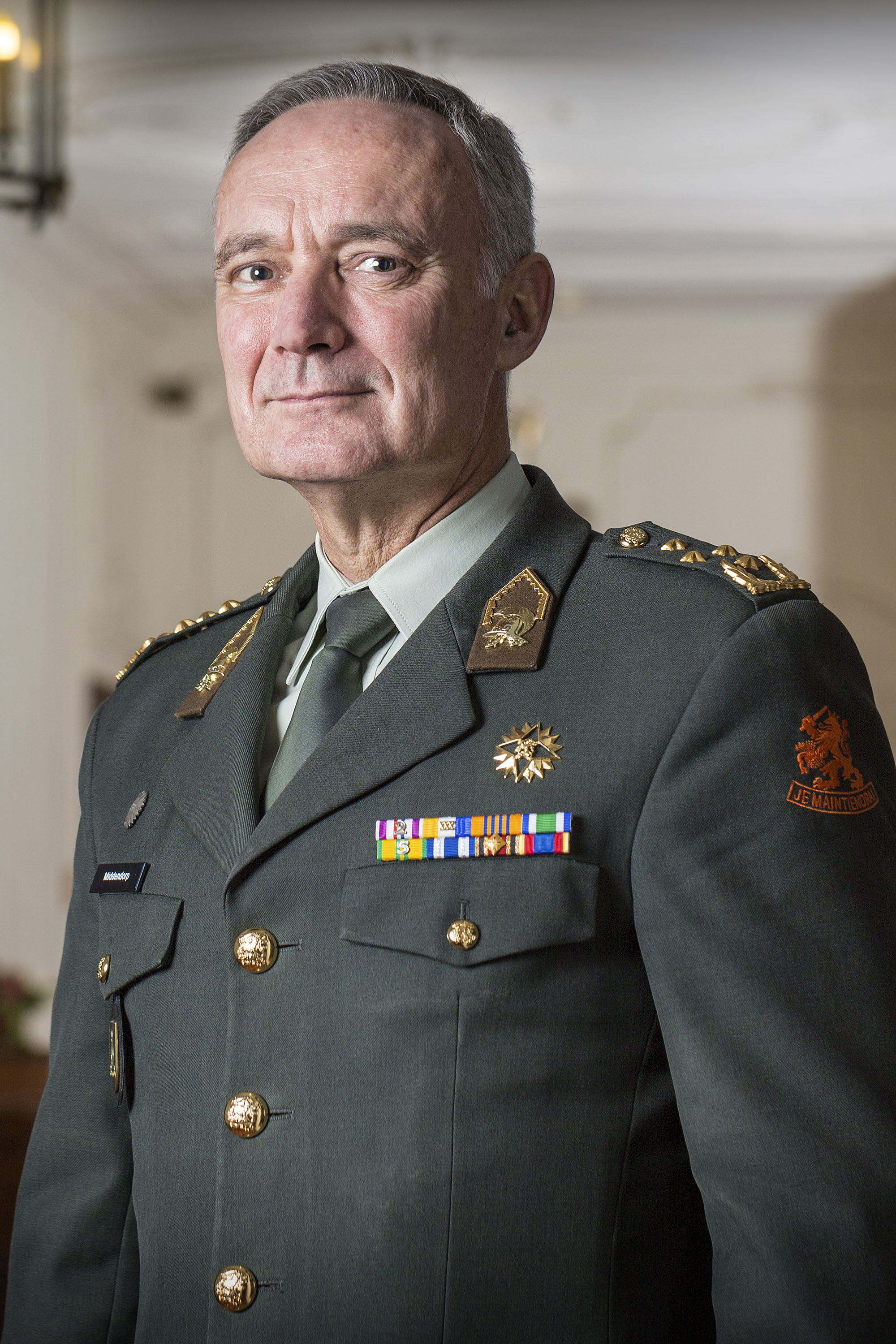 Commandant der Strijdkrachten Generaal Tom Middendorp